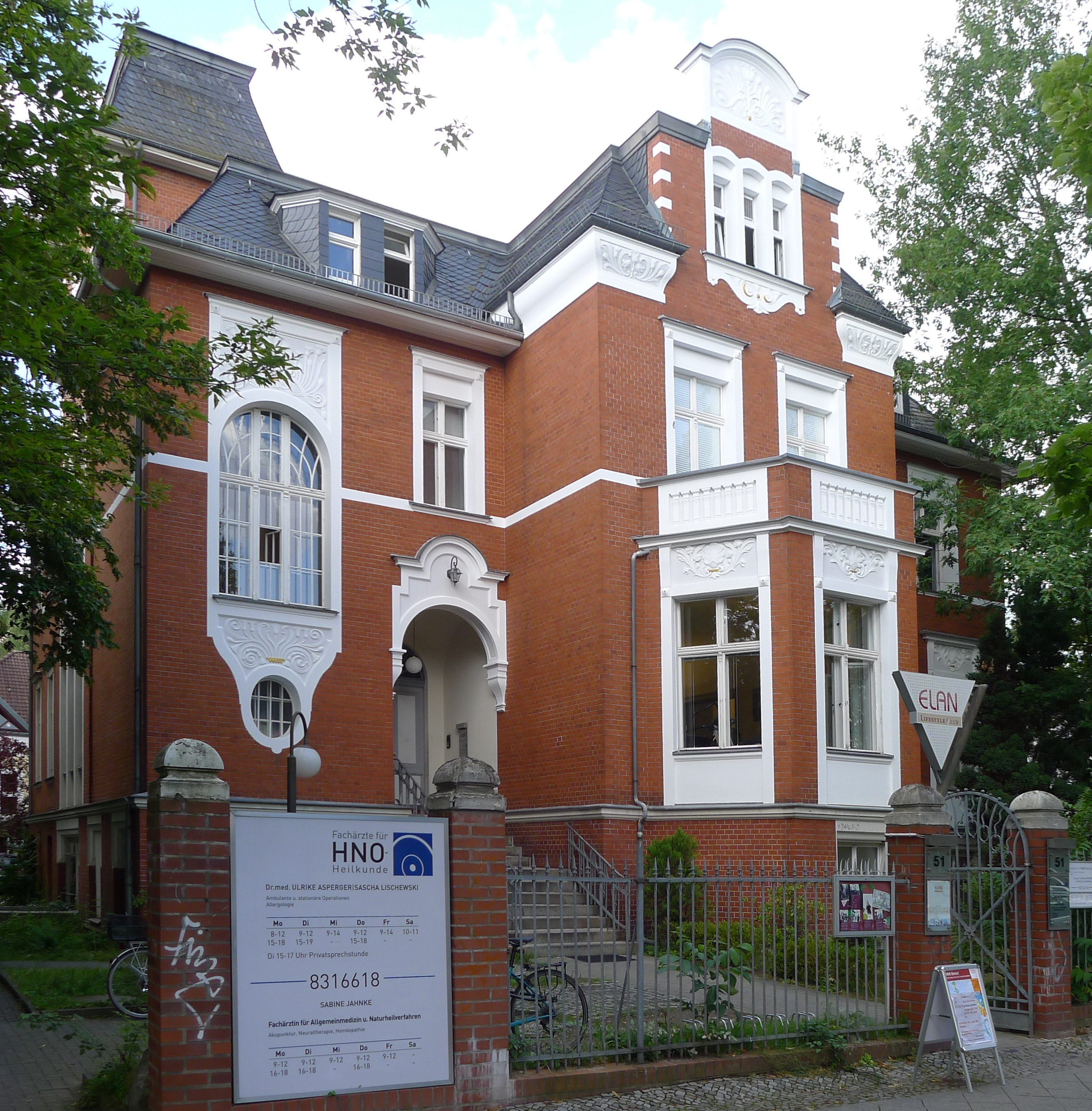 Villa in Berlin, erbaut 1898 für Carl Stangen